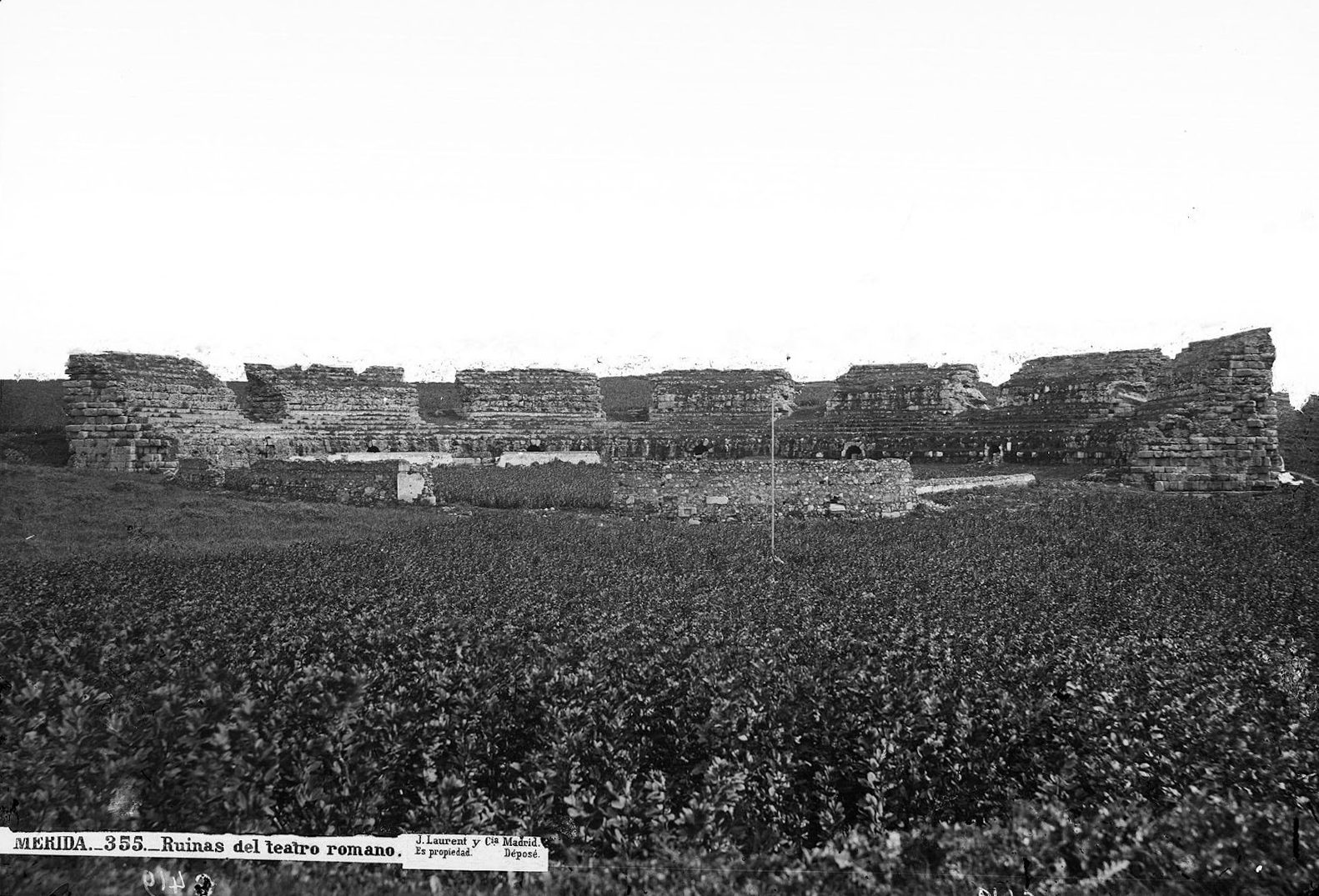 Fotografía del teatro romano de Mérida antes de su excavación, tomada por J. Laurent hacia el año 1867. El negativo original es de vidrio al colodión, del formato 27 x 36 centímetros. Se conseva en la fototeca del Instituto del Patrimonio Cultural de España, en Madrid. La fecha "1867" puede ser exacta, pues esta fotografía ya se relacionó en el catálogo de Laurent de 1867 (foto número 355 de Laurent). El rótulo "J. Laurent y Cía" fue añadido más tarde, a partir de 1875.